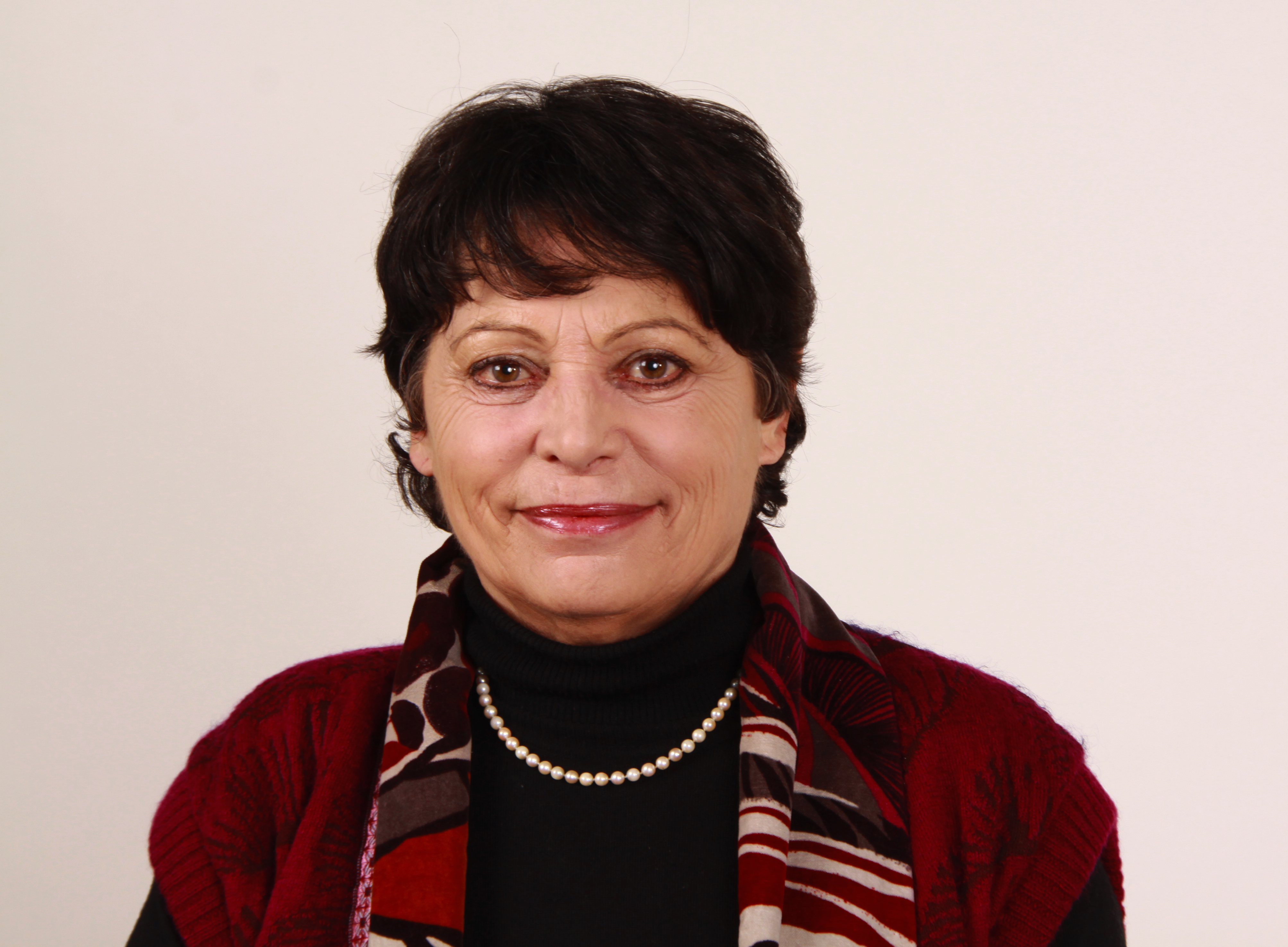 Abgeordnete/r Europaparlament